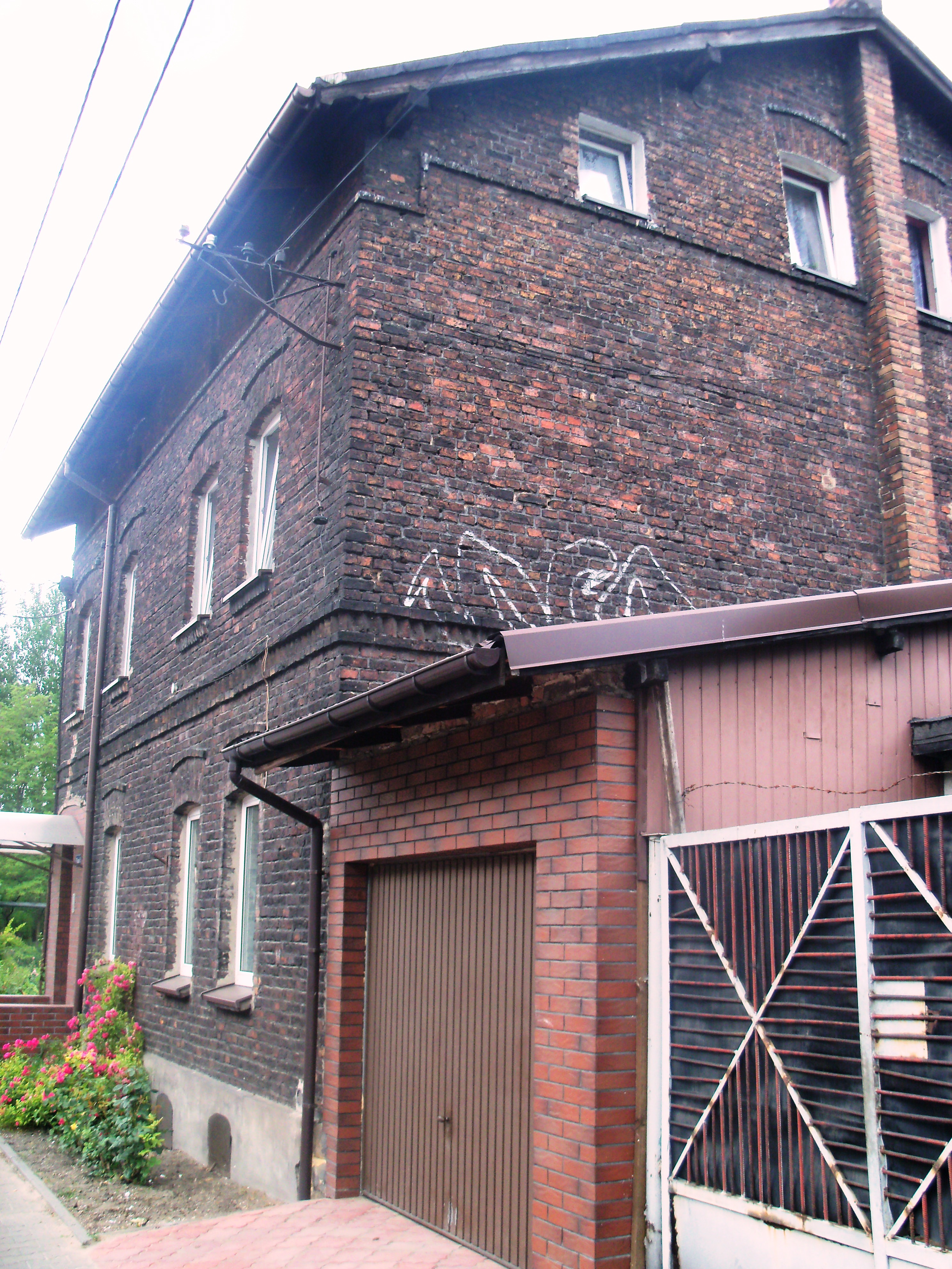 Ulica Teofila Ociepki w Katowicach-Janowie/Nikiszowcu (budynek pod nr 5)